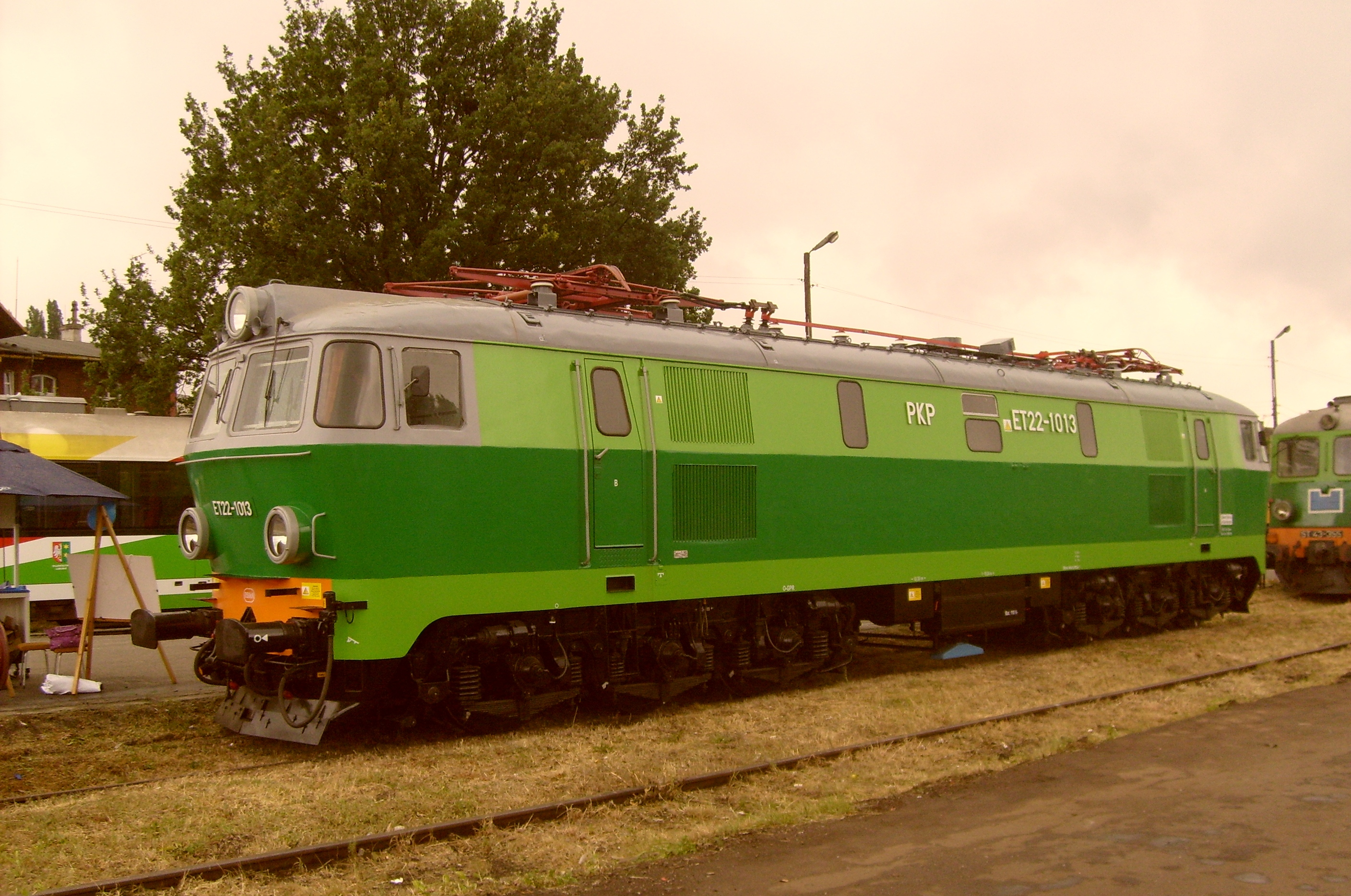 ET22-1013 po remoncie w czasie Dni Techniki Kolejowej w Zielonej Górze